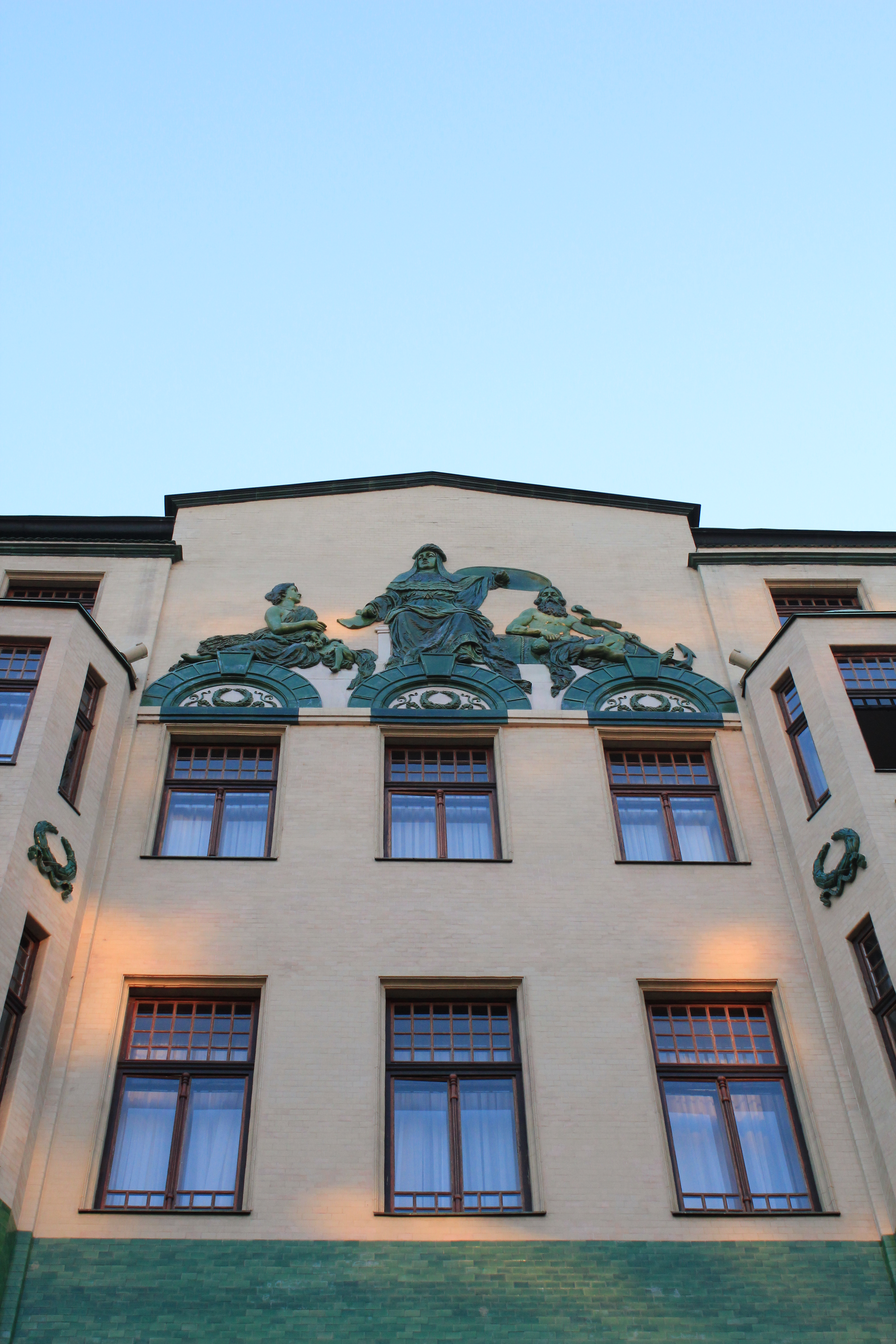 Zgrada hotela „Moskva“